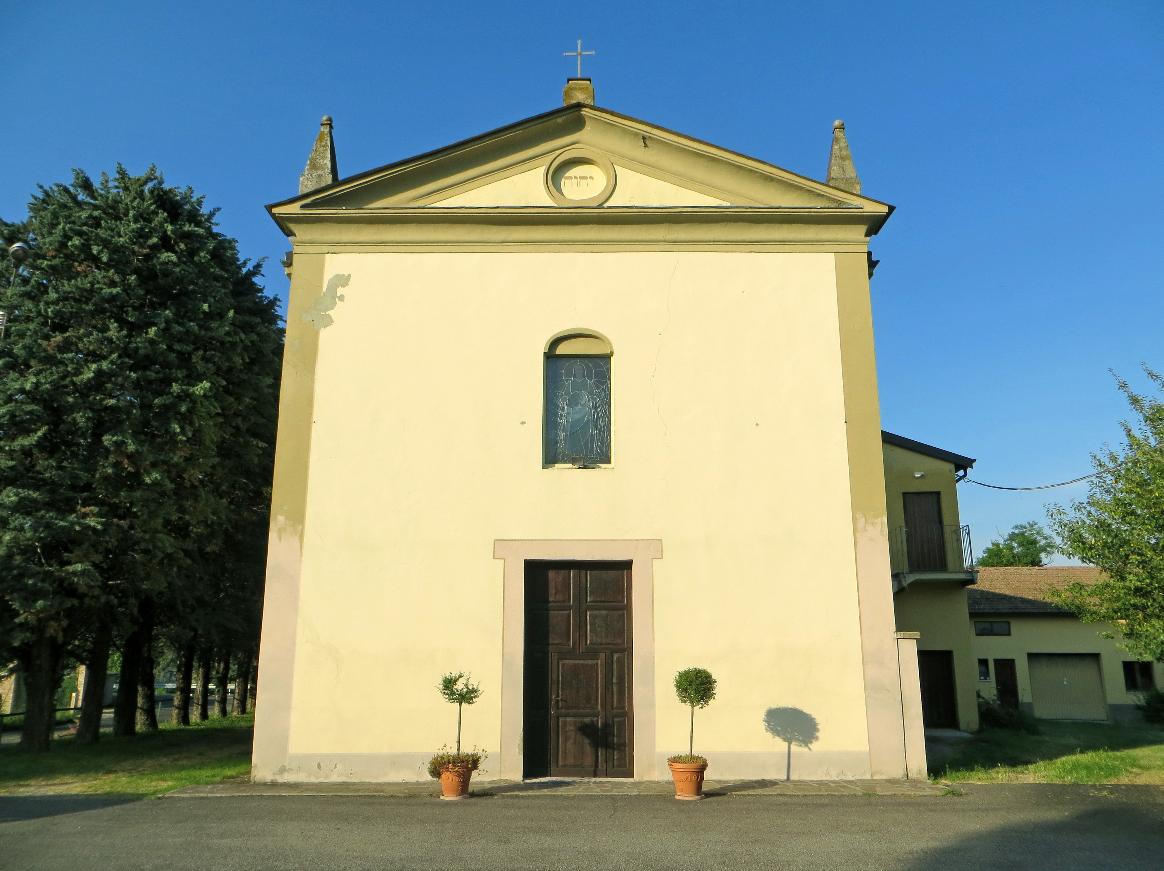 Chiesa di San Bartolomeo (Mariano, Parma) - facciata